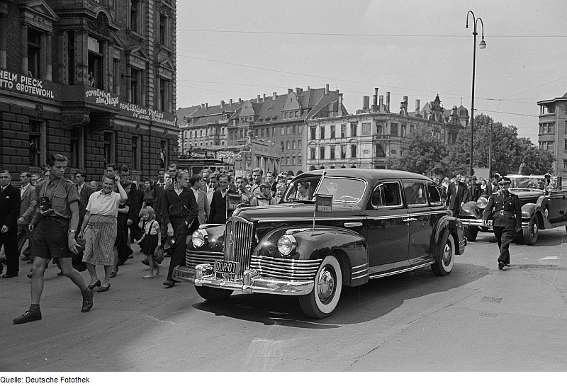 Original image description from the Deutsche Fotothek PKW-Konvoi Wilhelm Piecks inmitten von Menschen, im Hintergrund ein Haus mit Spruchbändern geschmückt